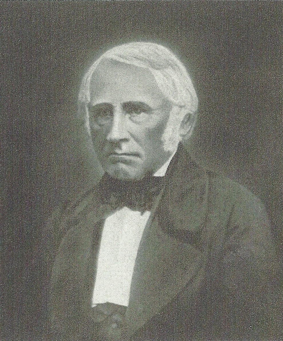 Porträt von Sebastian Lucius (1781-1857)